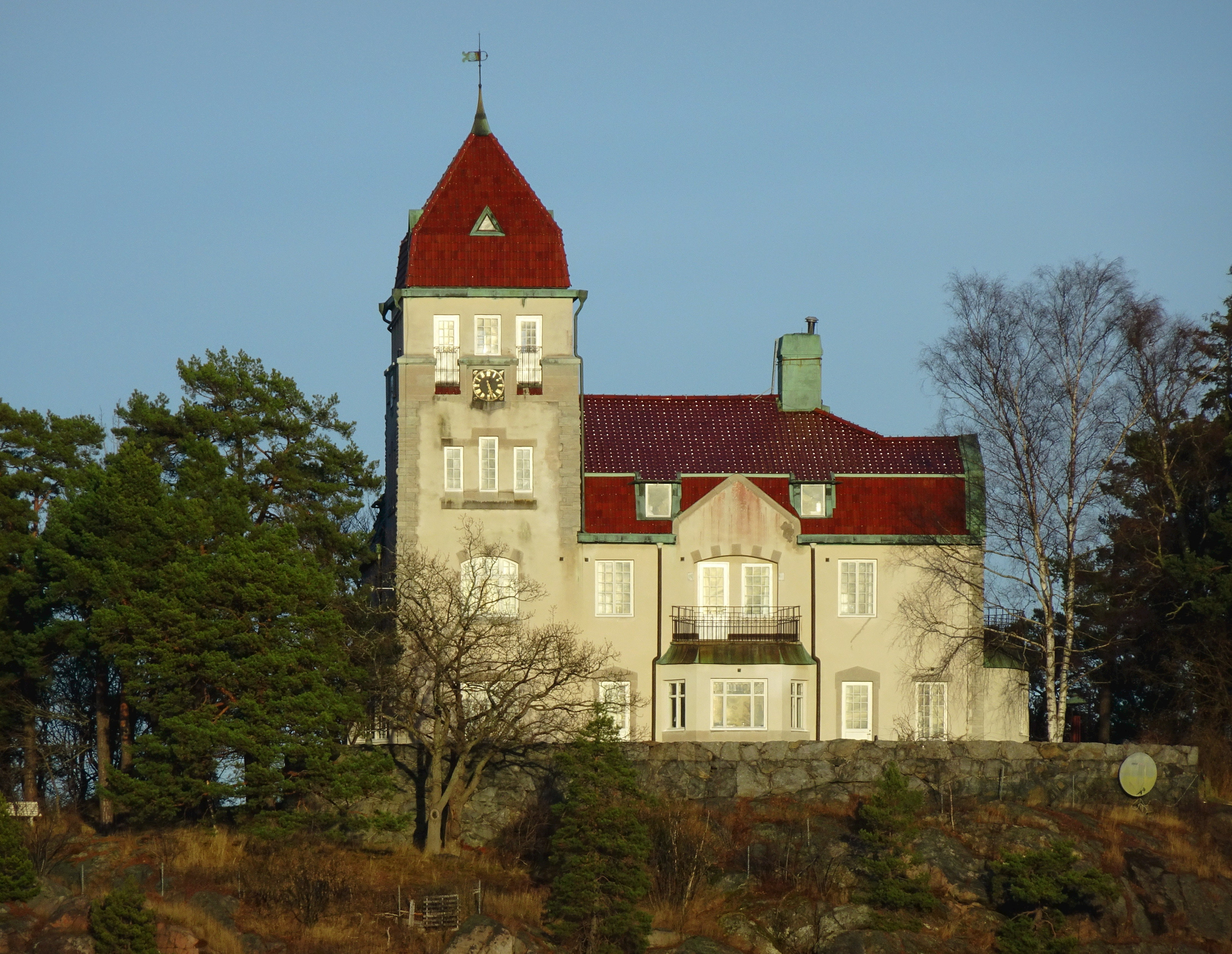 Villa Baggås, Salrsjöbaden